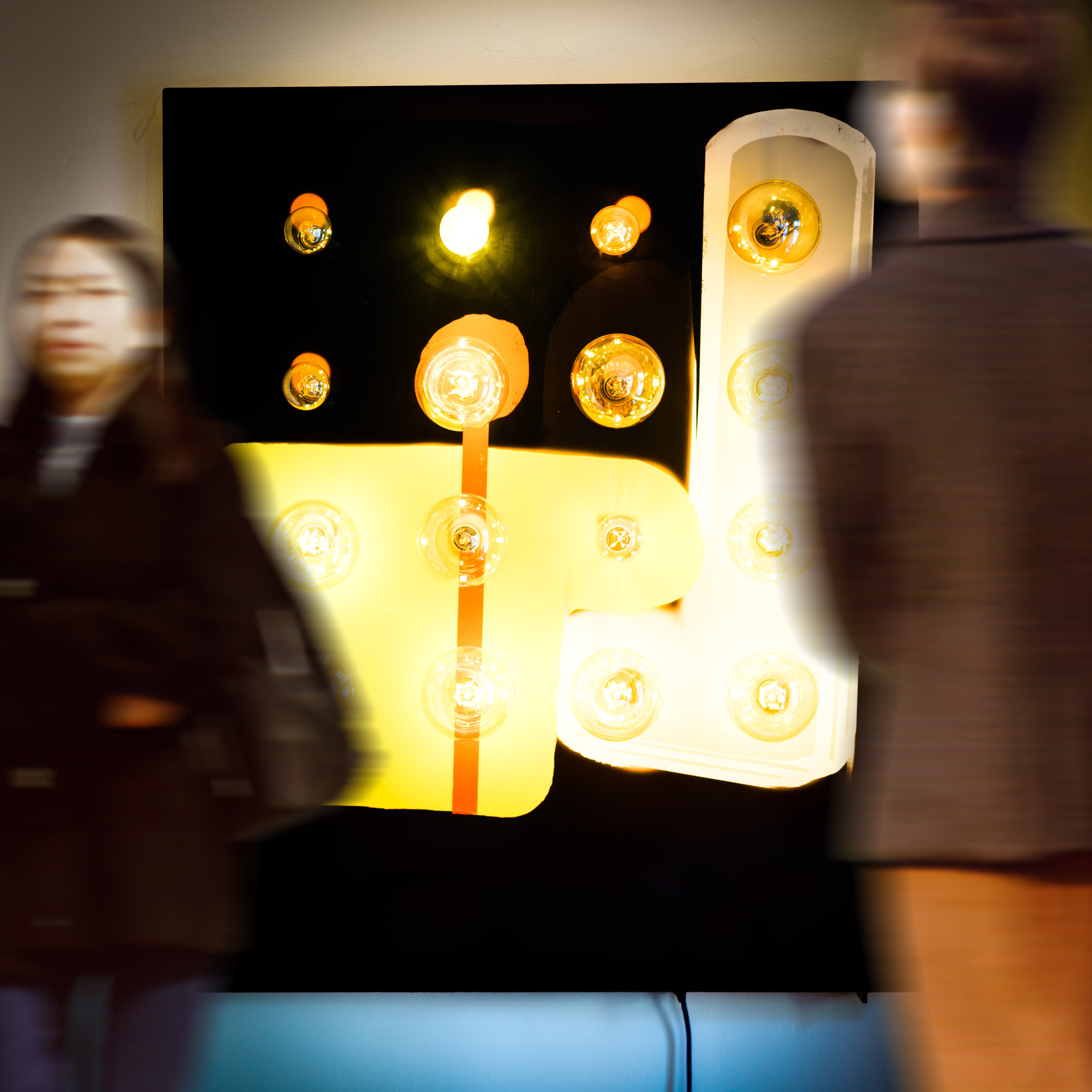 Un exemple de machine présentée à la Cité des sciences et de l'industrie pour le salon Maker Faire Paris Cell.ion par Grégoire Falque (2017) à la Maker Faire Paris